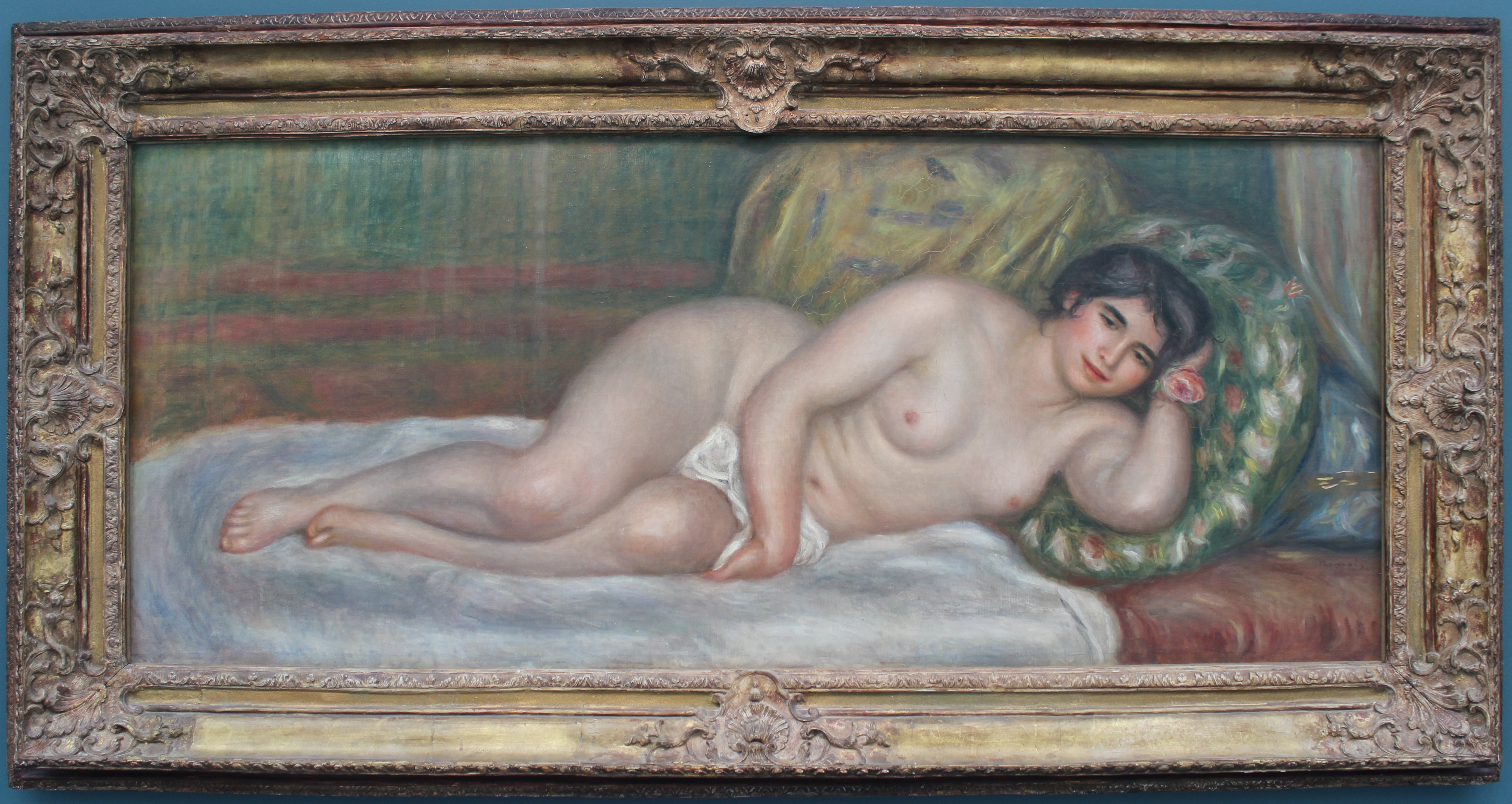 París, Orangerie. Femme nue couchée (Gabrielle). Pierre-Auguste Renoir.